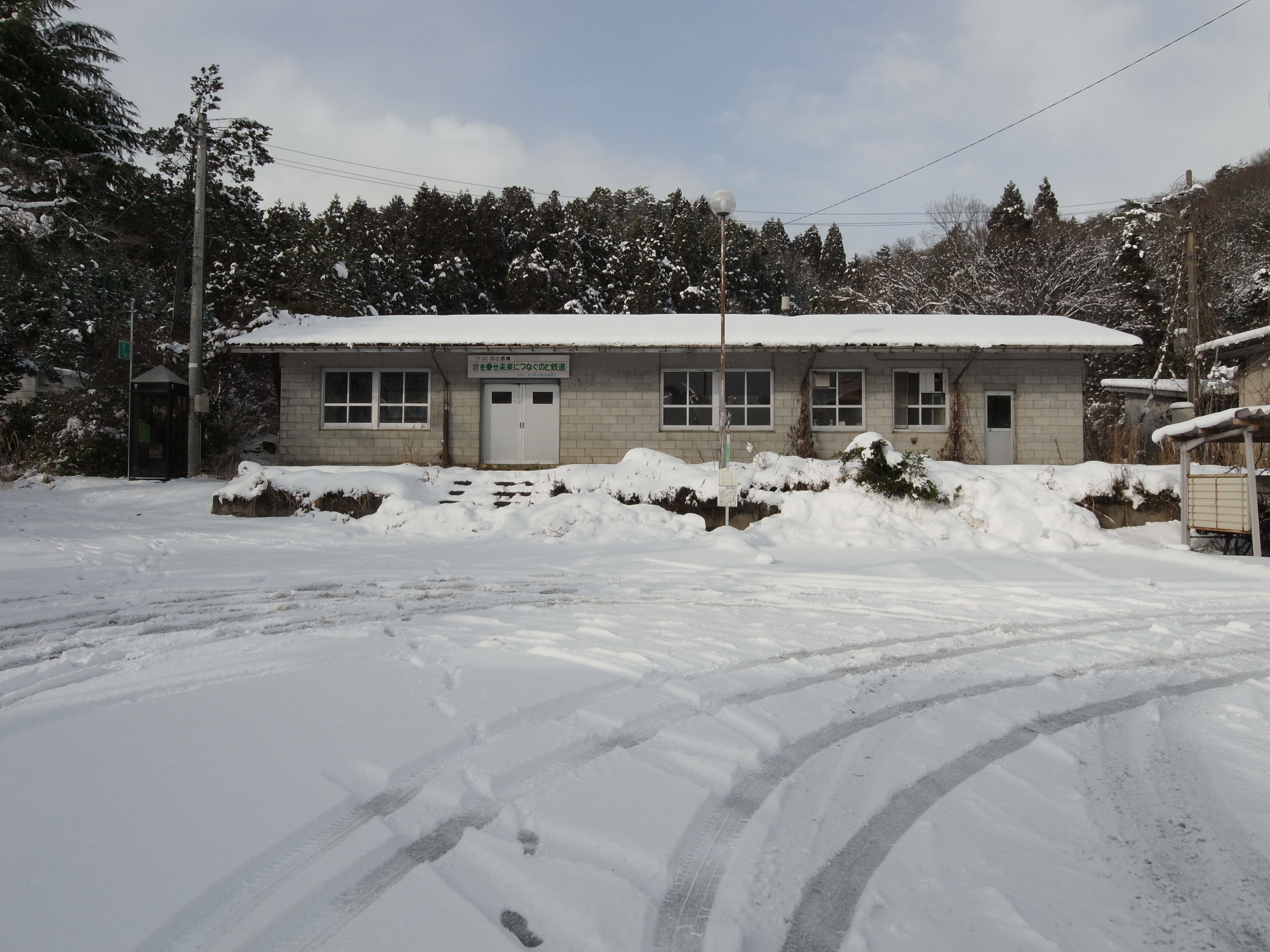 廃止後ののと鉄道能登線鵜川駅駅舎